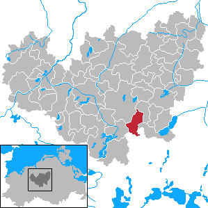 Langhagen in Mecklenburg-Vorpommern - District Güstrow